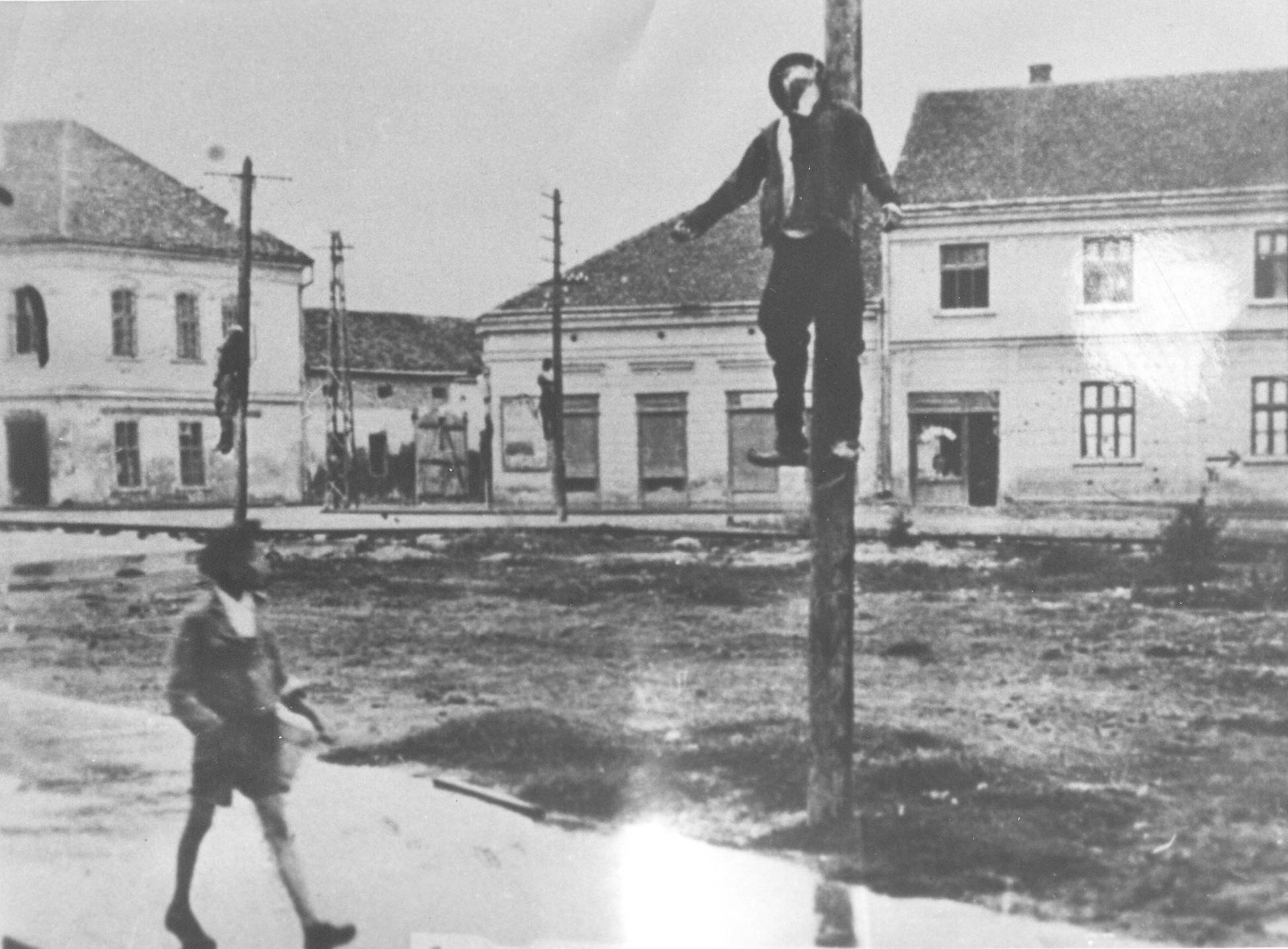 Srpskohrvatski / српскохрватски: Vešanje prethodno streljanih rodoljuba u Šapcu 1941. godine.